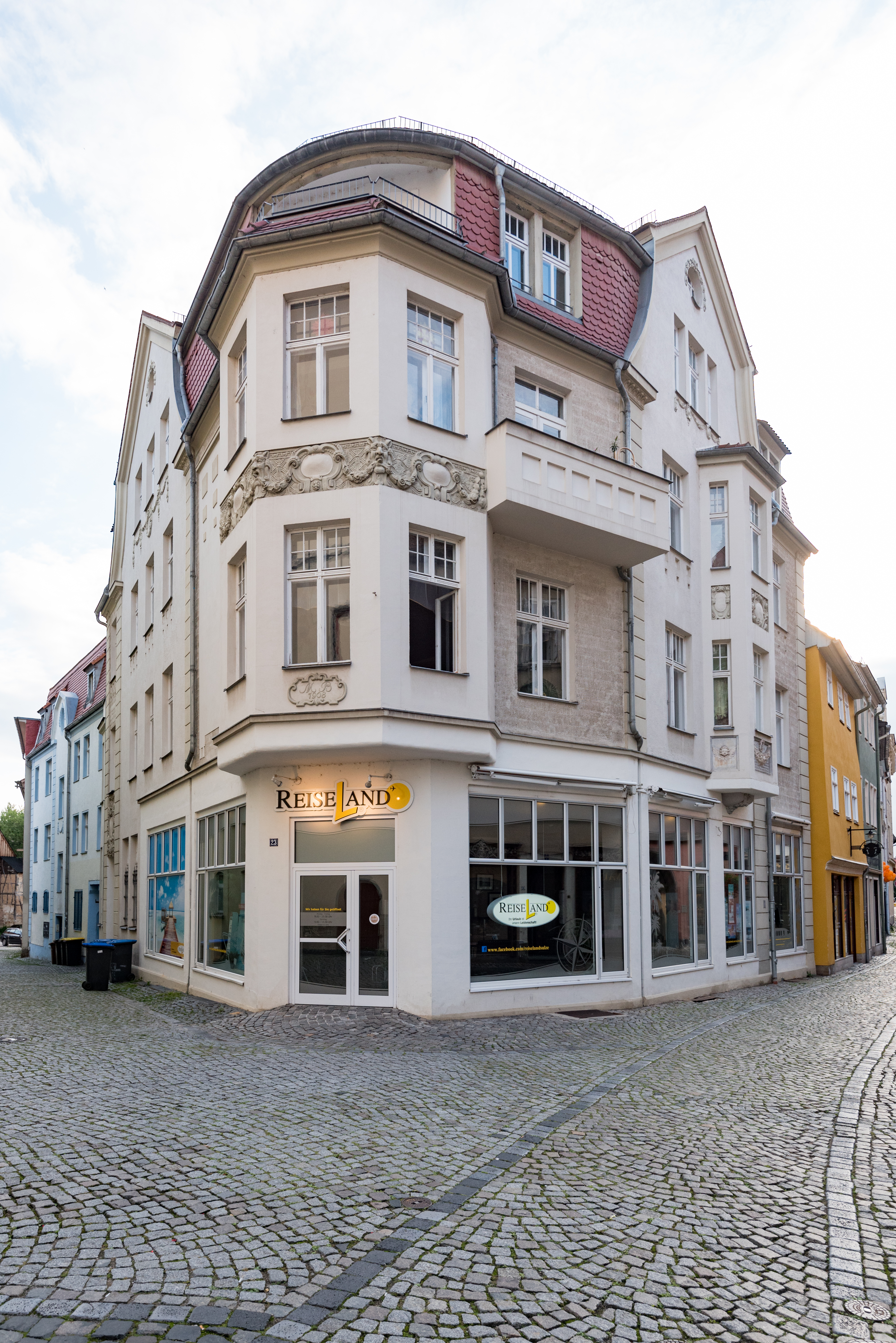 Naumburg (Saale), Herrenstraße 23